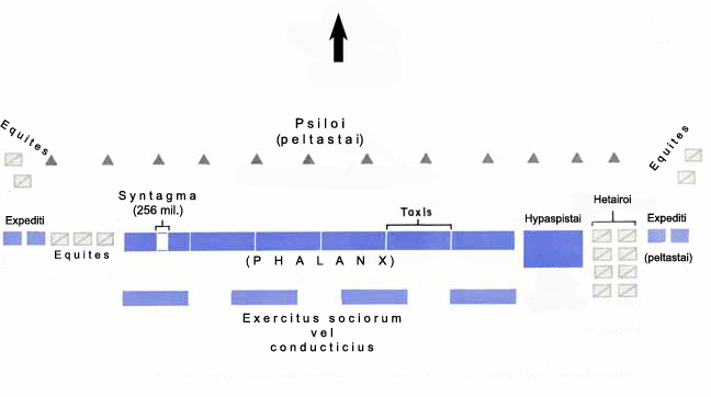 Phalanx Macedonica in acie. Opus meum.